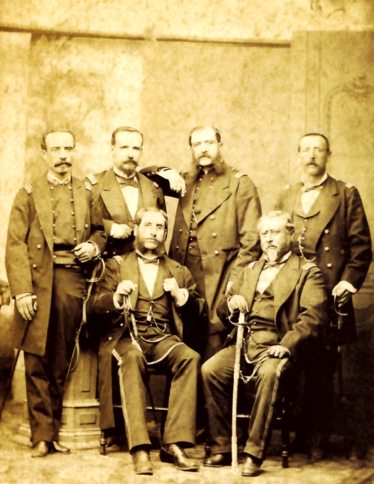 Fotografía captada en el estudio Cosme Rodrigo & Co. hacia 1880, donde se aprecia a Andrés A. Cáceres (primero de la izquierda, sentado) junto a Ramón Zavala. Parados: Remigio Morales Bermúdez, César Canevaro, Francisco de Mendizábal y Andres Freyre Arias